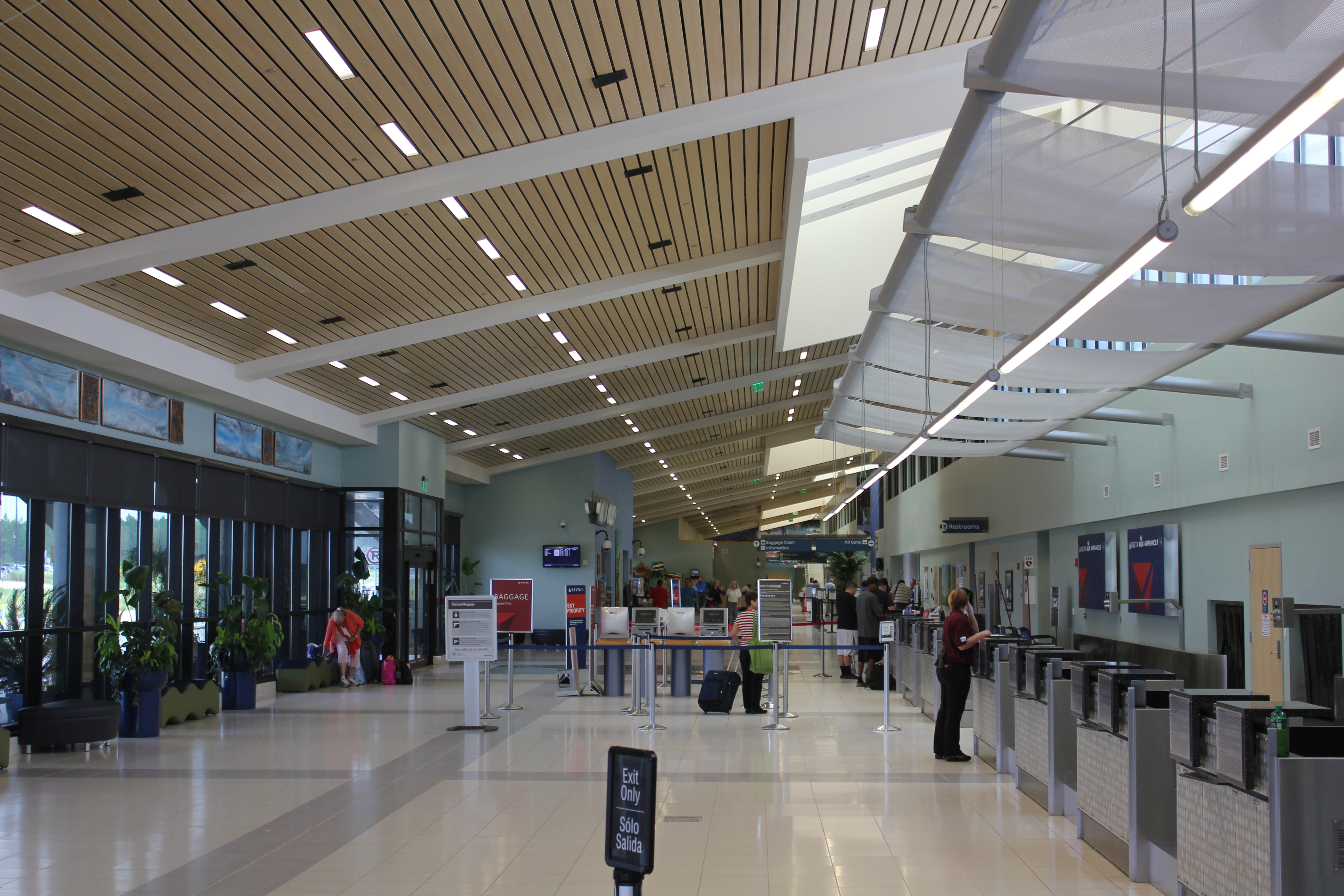 Inside